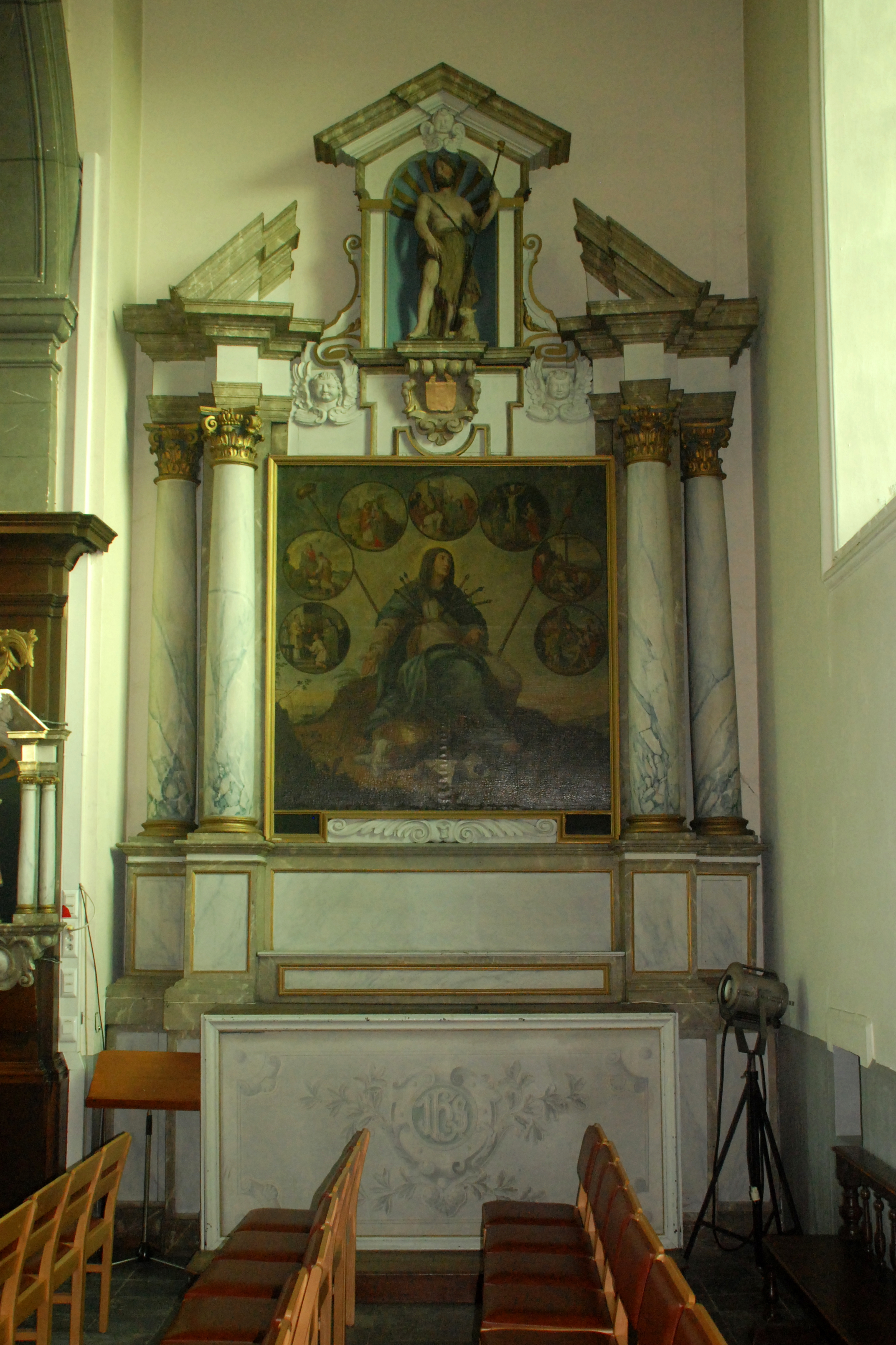 Belgique - Brabant wallon - Église de Court-Saint-Étienne